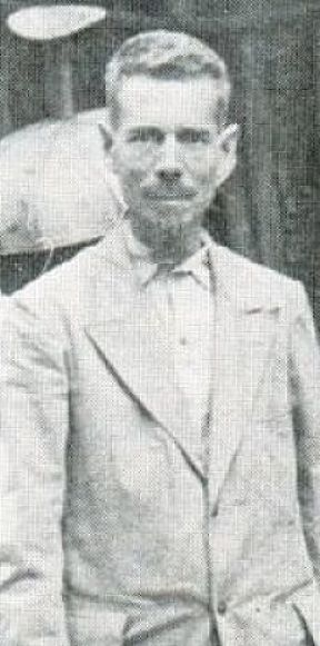 Eugène Gaspard Marin dit Gassy Marin, né le 8 octobre 1883 à Watermael-Boitsfort et mort en 1969 à Whiteway (Grande-Bretagne) est un peintre décorateur, typographe, libertaire et espérantiste belge, pionnier du mouvement des communautés libertaires.